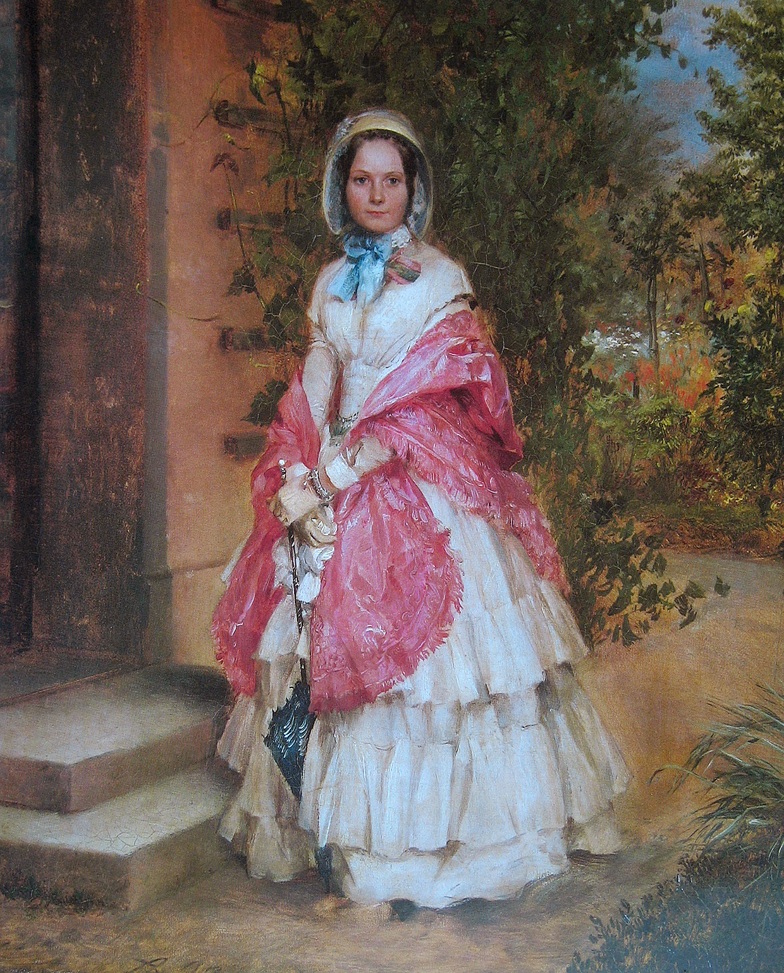 Clara Schmidt von Knobelsdorff ready to go outlabel QS:Len,"Clara Schmidt von Knobelsdorff ready to go out" label QS:Lde,"Frau Clara Schmidt von Knobelsdorff" label QS:Les,"Clara Schmidt von Knobelsdorff lista para salir"